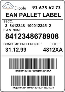 Etiqueta estándard GS1-128